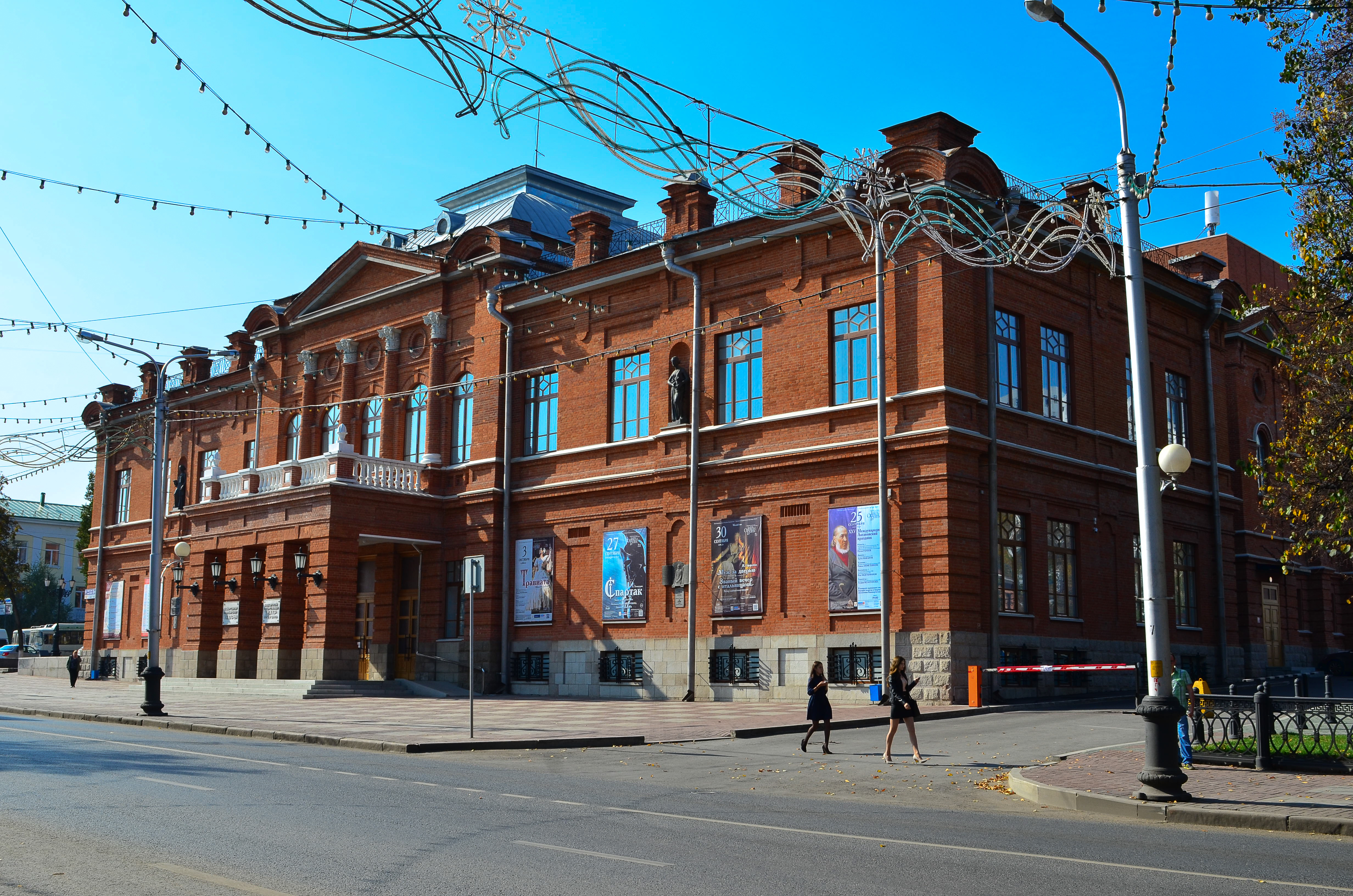 Народный дом С.Т. Аксакова: улица Ленина, 5а / улица Пушкина, Уфа, Башкортостан